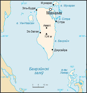 Карта Бахрэйна